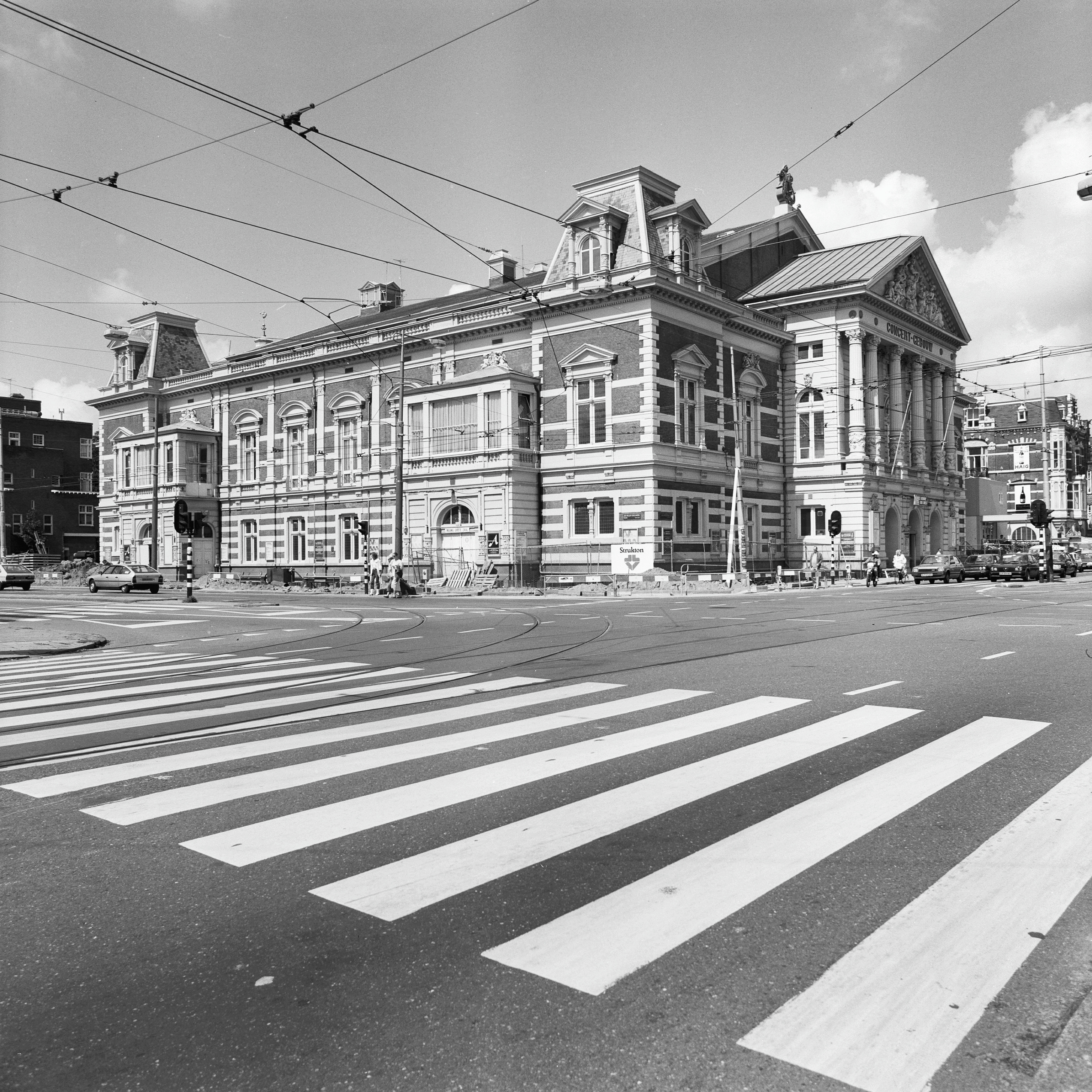 CONCERTGEBOUW: Exterieur VOORGEVEL, LINKER ZIJGEVEL